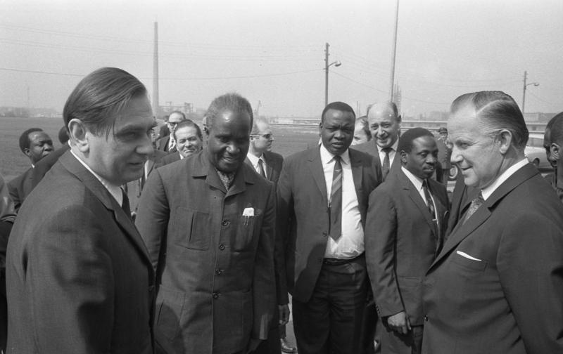 Staatsbesuch Sambia, Präsident Kenneth D. Kaunda Farbwerke Hoechst